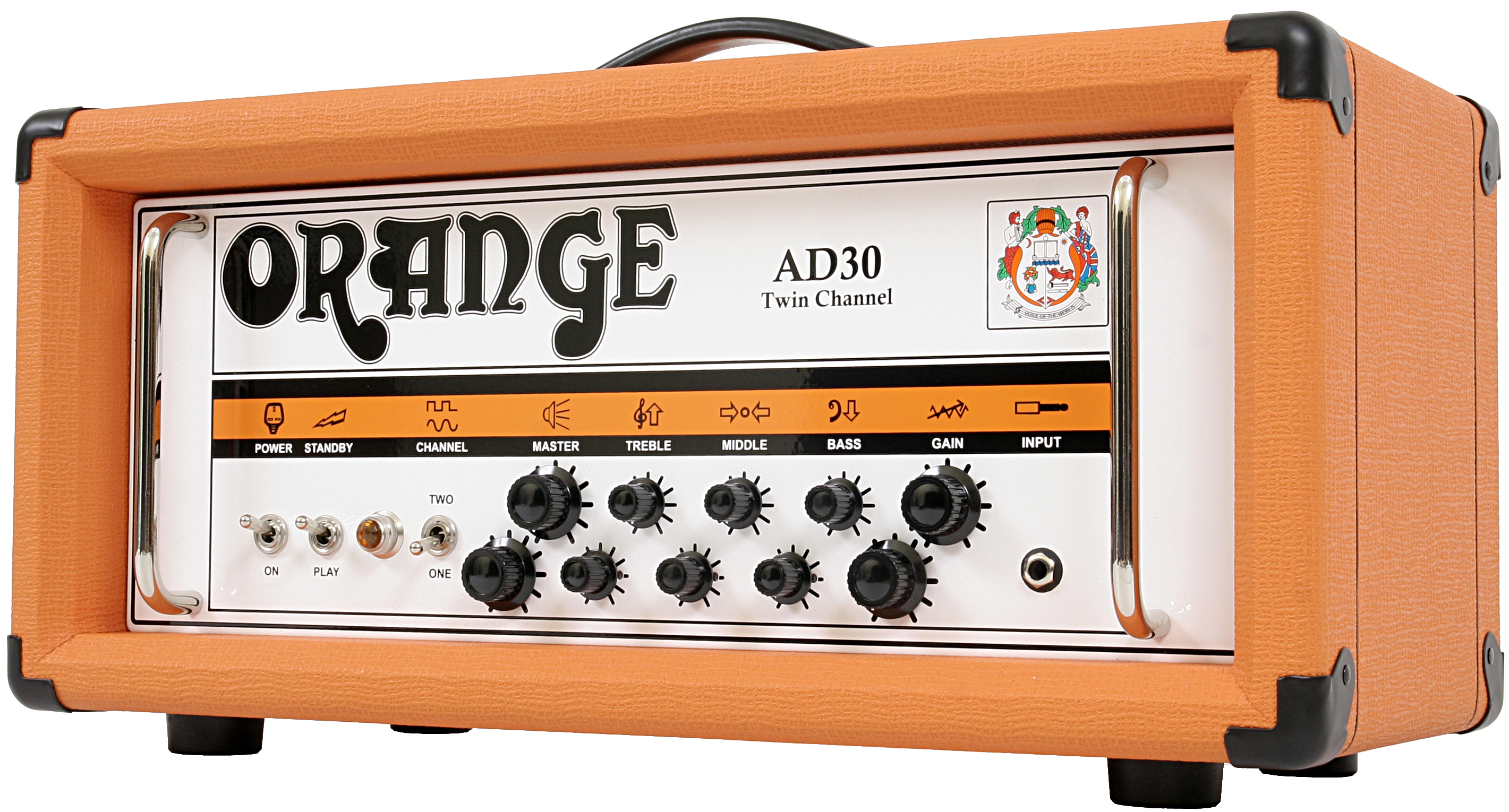 Wzmacniacz gitarowy AD30HTC firmy Orange